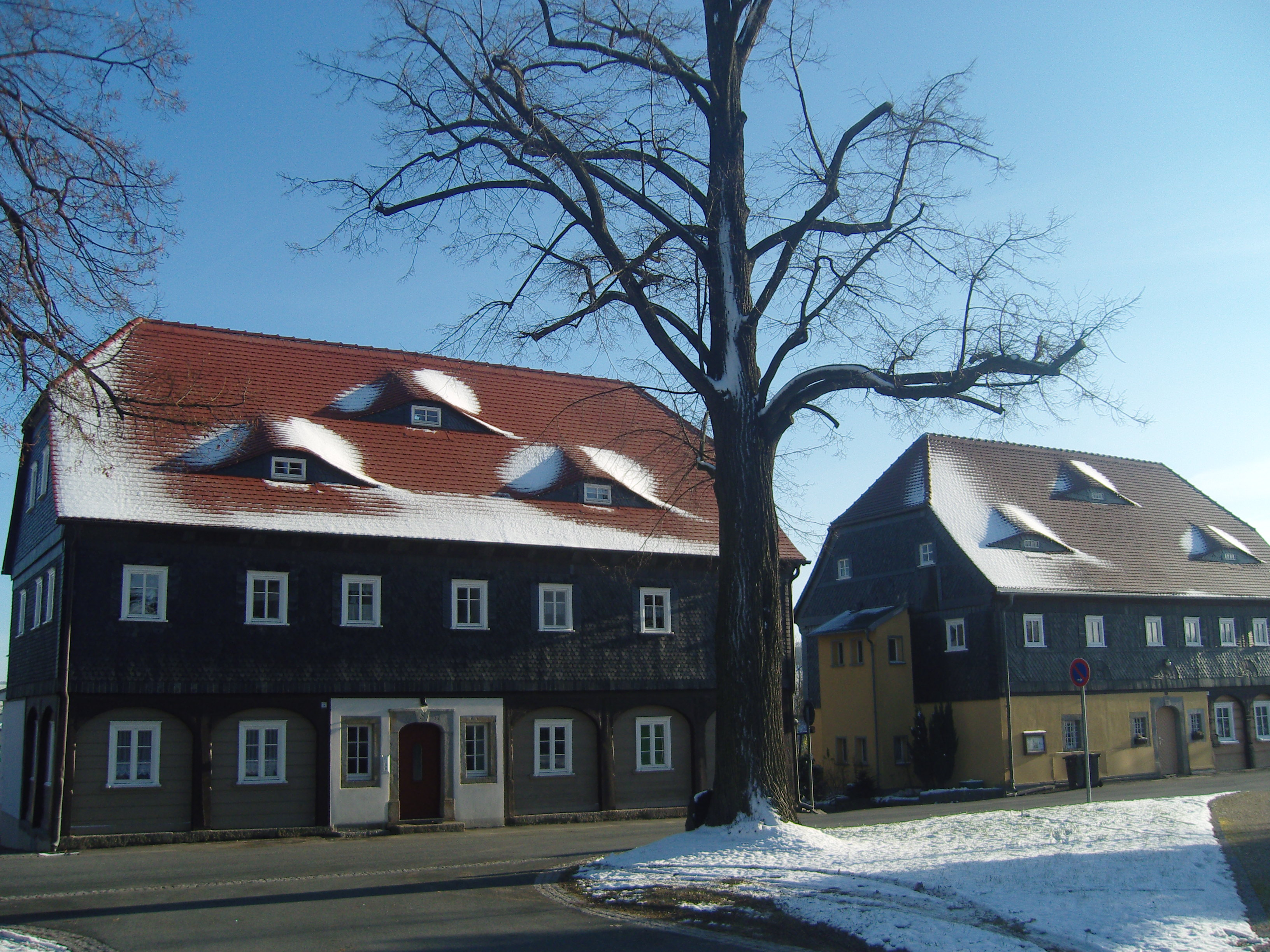 Umgebindehäuser in Niedercunnersdorf, Obercunnersdorfer Straße 10 - 12